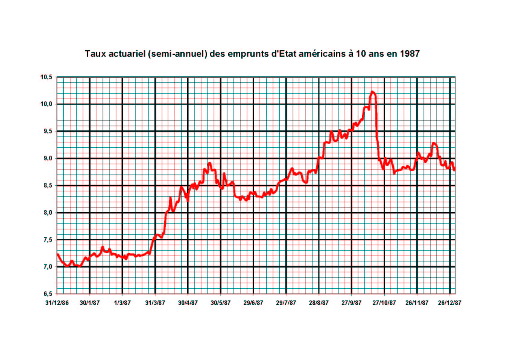 Graphique réalisé par moi-même